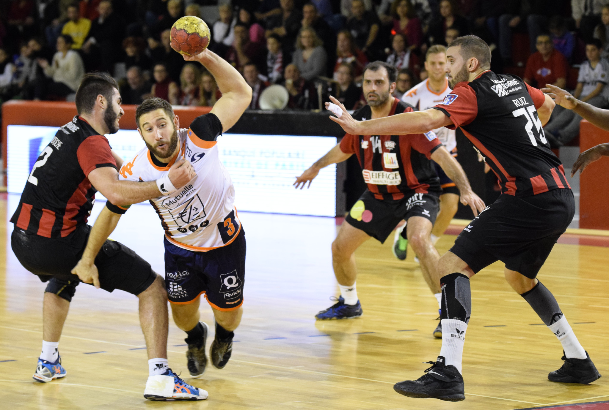 Rencontre de ProD2 entre l'US Ivry handball et Chartres HB. A Ivry, le 06 décembre 2014.